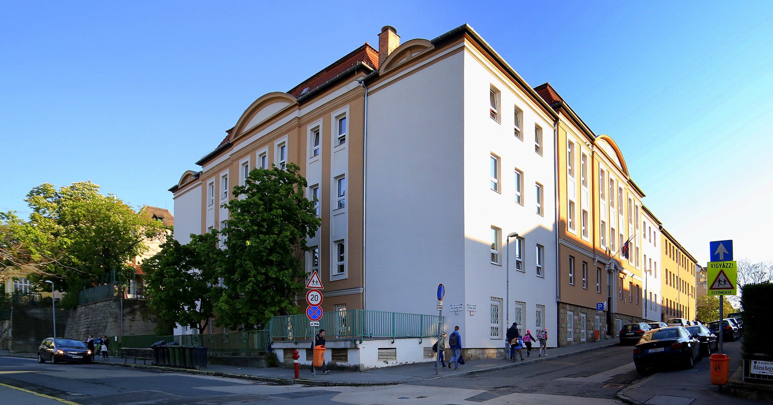 Szent Angéla Ferences Általános Iskola és Gimnázium. Cím: Budapest, Bejárat: Zivatar utca 2-4., Ady Endre u. 3, 1024